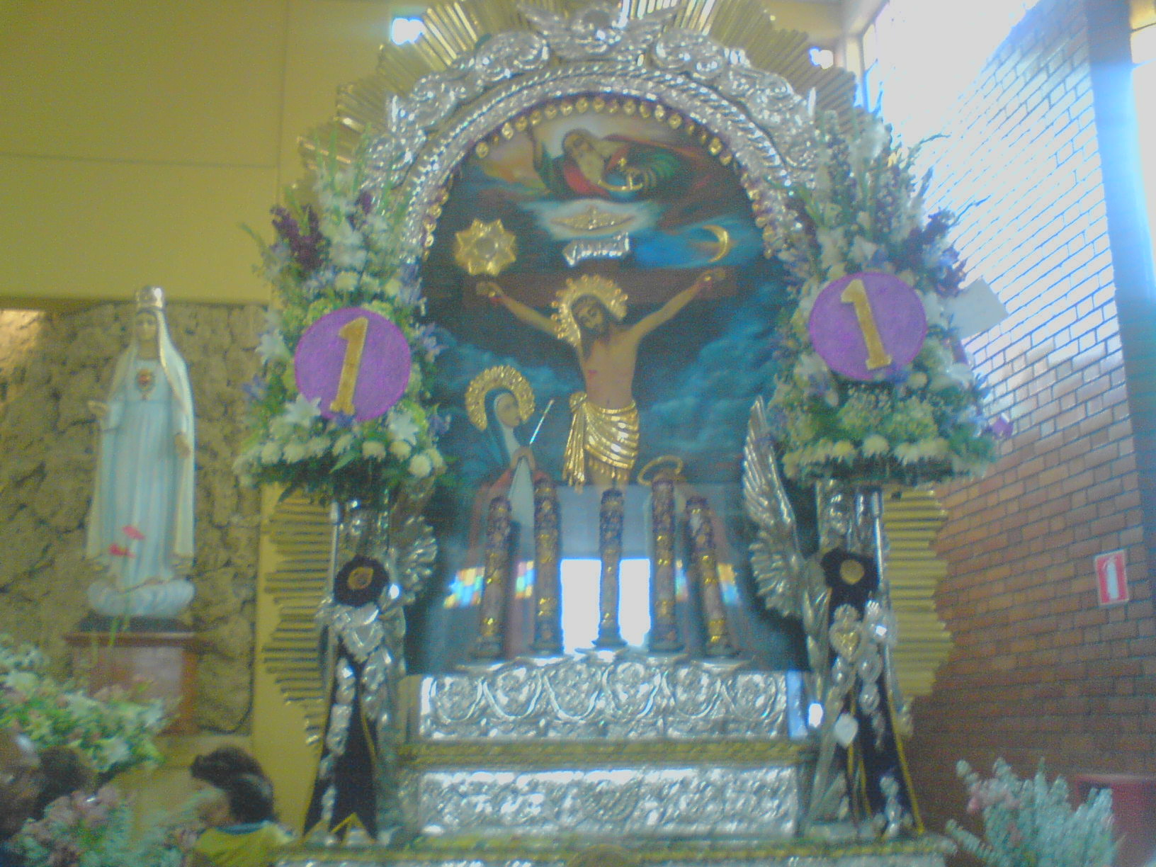 Guardada 2008